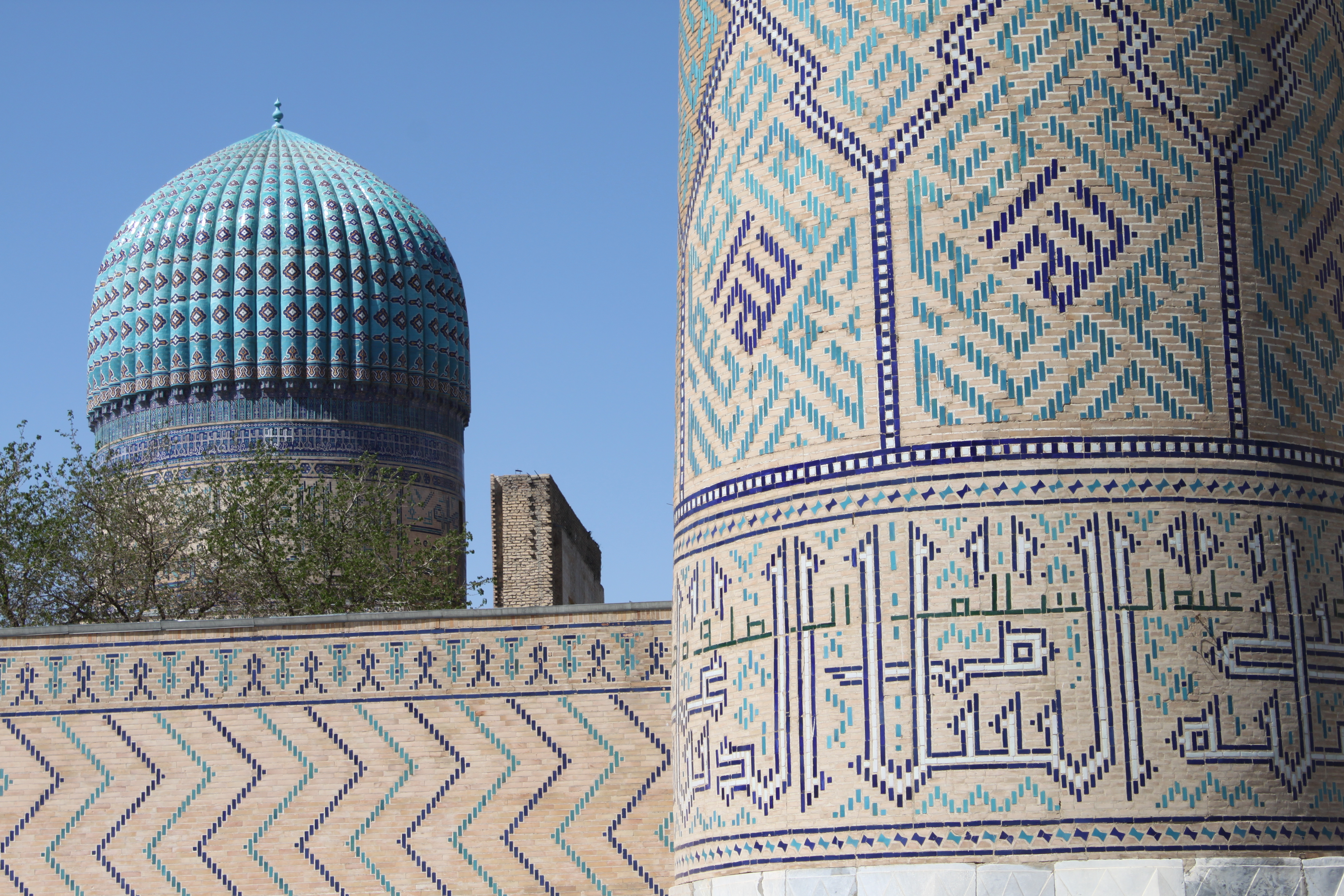 Détail du portail d'entrée au premier plan et vue sur le côté Sud de Bibi Khanoum